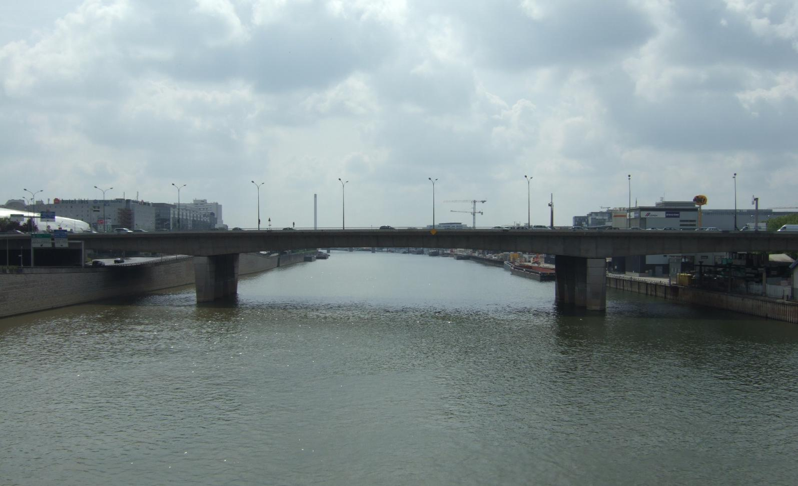 Le pont Amont, vu depuis le pont National